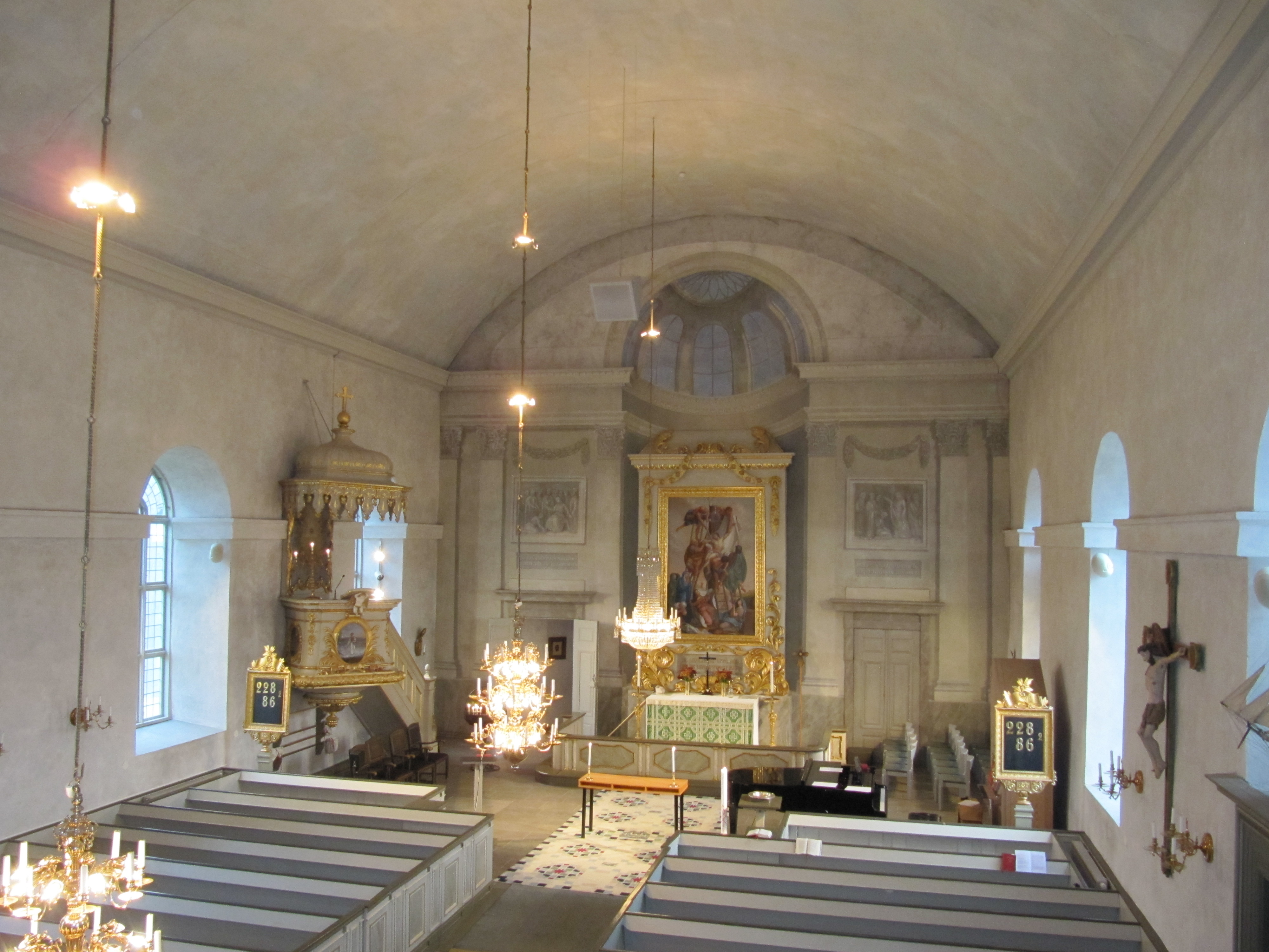 Kyrkorum i Timrå kyrka